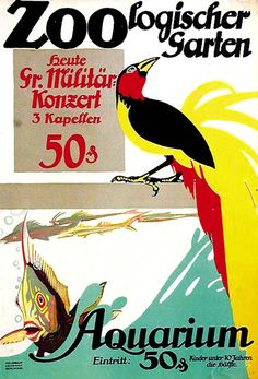 Imre Földes Zoologischer Garten - Ort und Datum noch nicht bestimmt (der Eintritt von 50 Pfennig ₰ deutet auf einen Zoo im Deutschen Kaiserreich hin)